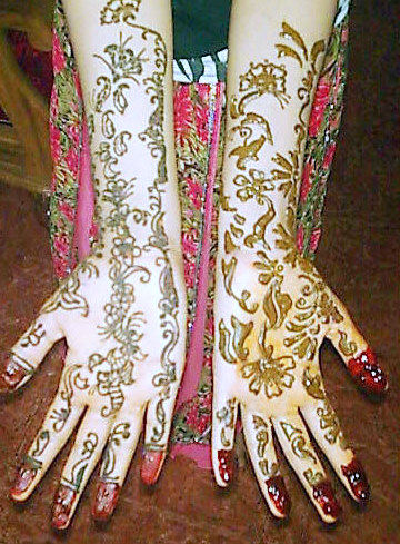 MYLANCHI- DESIGN